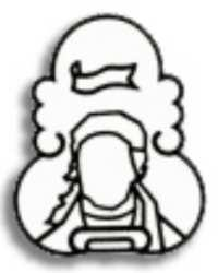 Escudo de San Bartolo Morelos